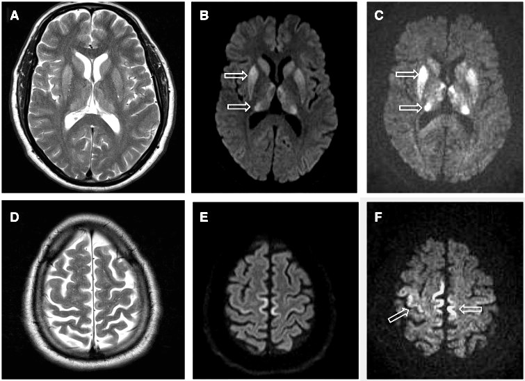 Better brightness